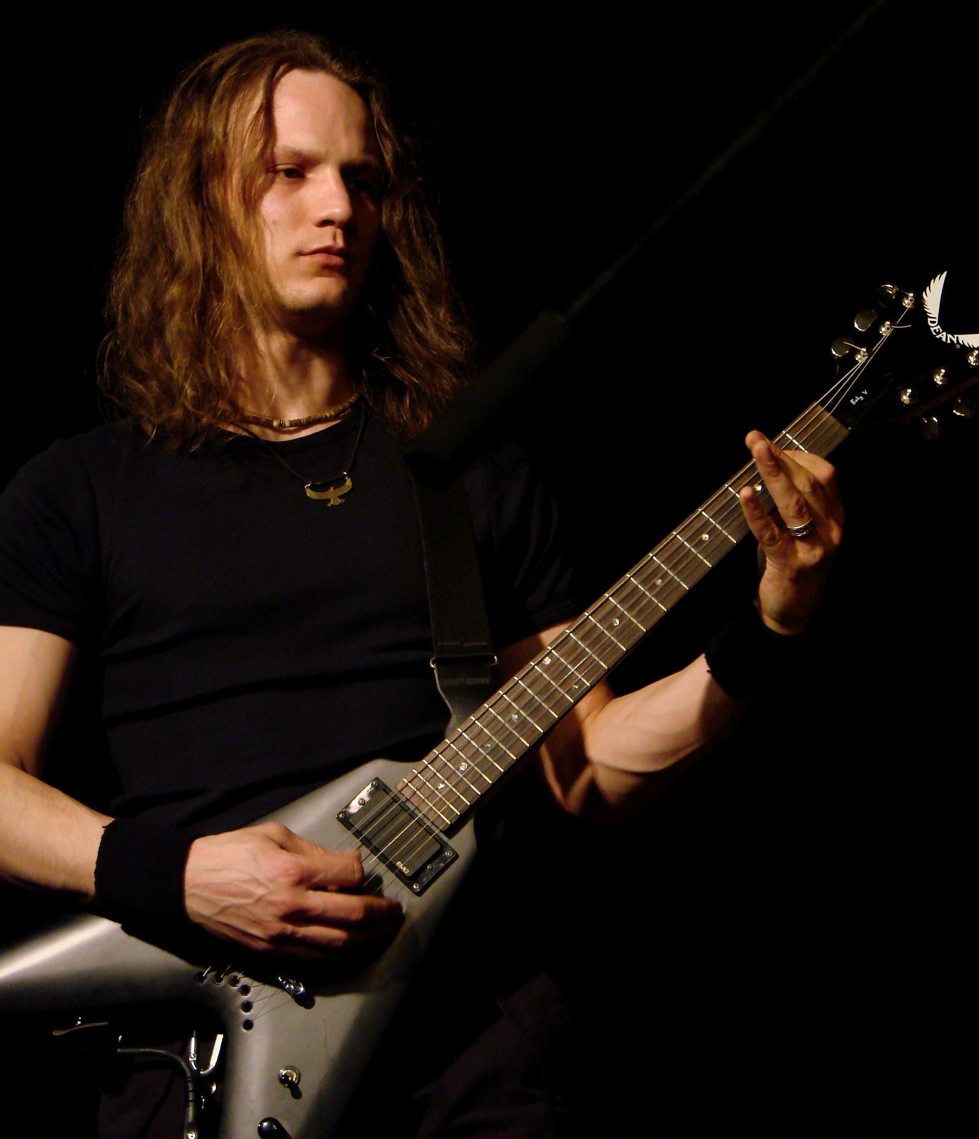 Melechesh au Chaulnes Fest, le 22/03/08.